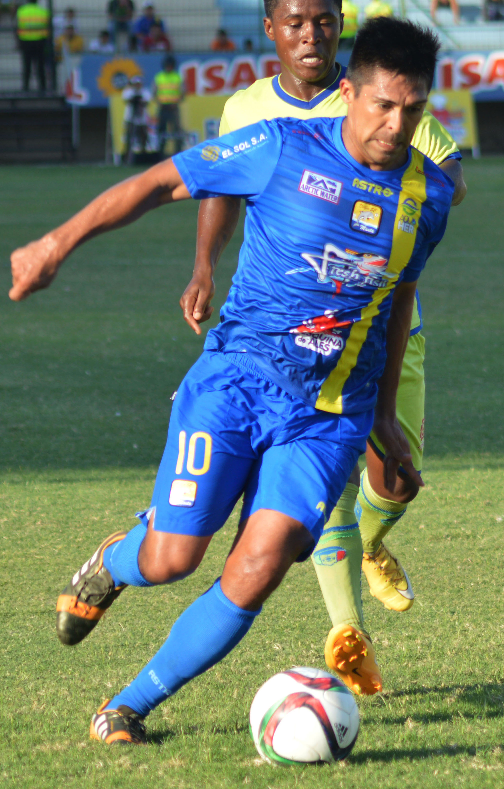 Carlos Rearte jugando en Delfín Sporting Club de Ecuador